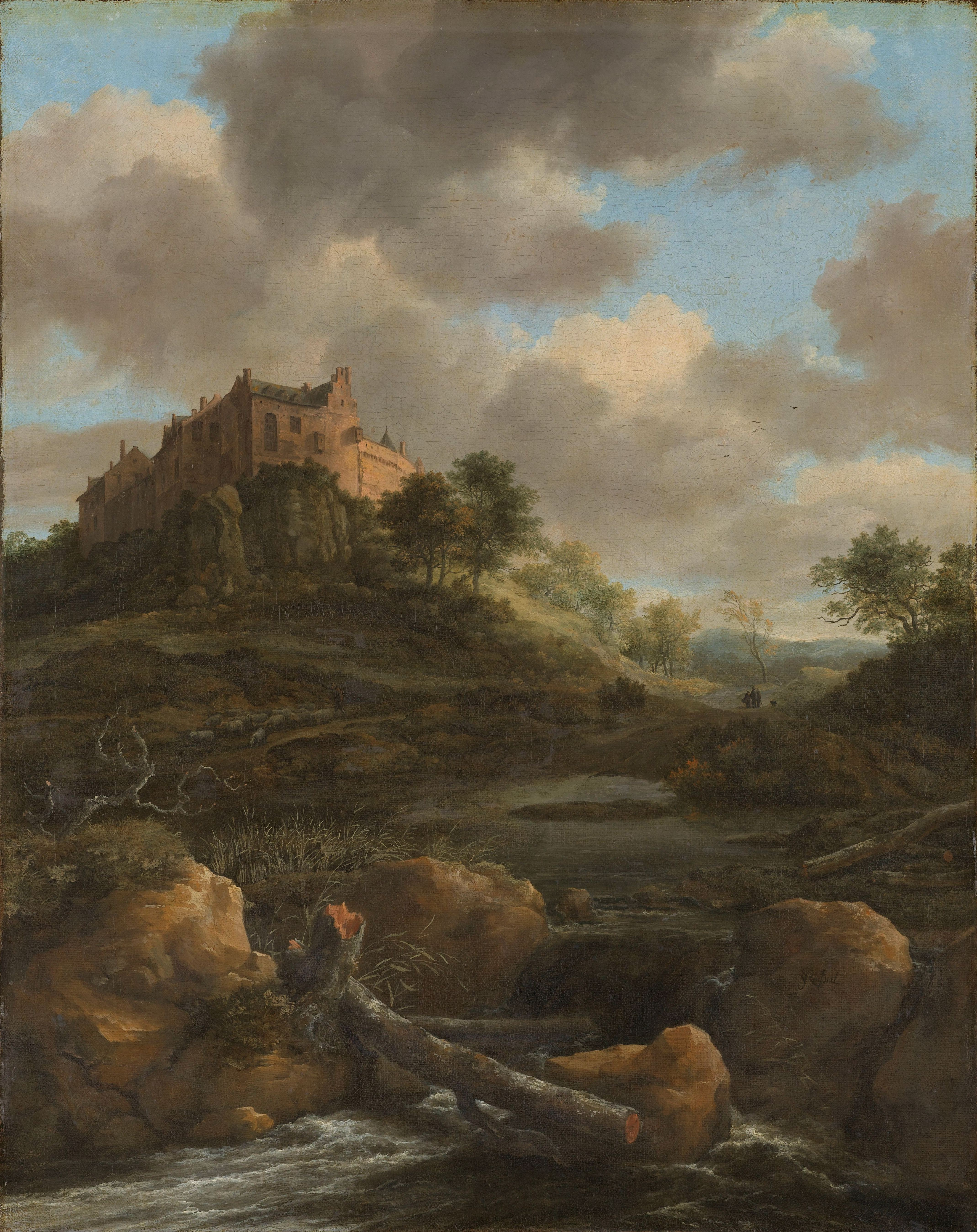 Kasteel Bentheim. Het kasteel gelegen op een heuveltop, gezien van beneden bij een beek met een watervalletje, rotsen en boomstammen.; Jacob Isaacksz van Ruisdael (ca. 1628–1682), olieverf op doek, 1650–1682